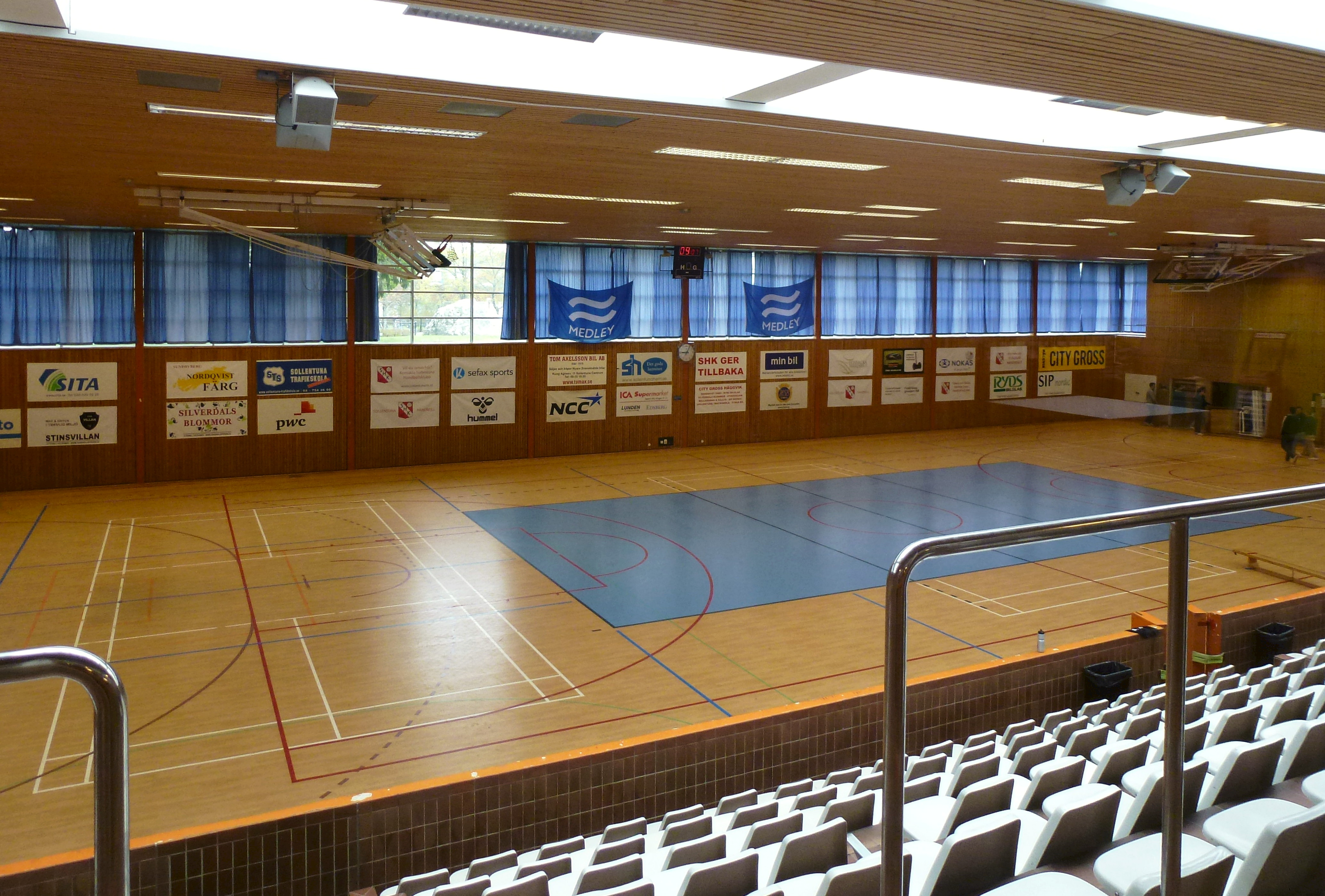 Sollentuna sim- och sporthall, arkitekt Gustaf Rosenberg (Kasper Salin-priset 1976).